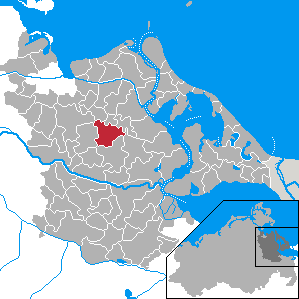 Karlsburg, Landkreis Ostvorpommern, Mecklenburg-Vorpommern